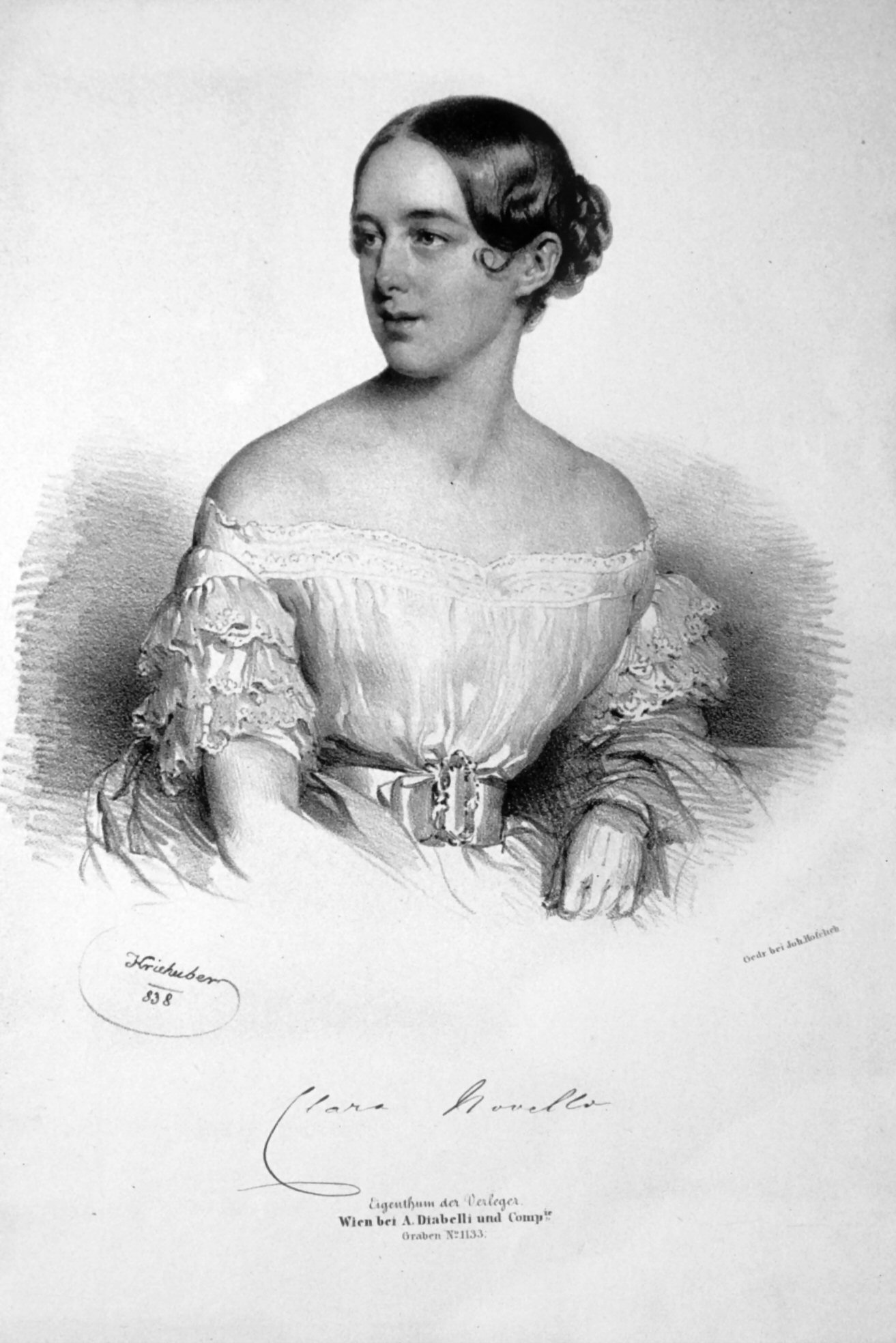 Clara Novello (1818-1908), Sängerin (Sopran) Lithographie von Josef Kriehuber, 1838 Wurzbach 1573 (Werksverzeichnis Josef Kriehuber)